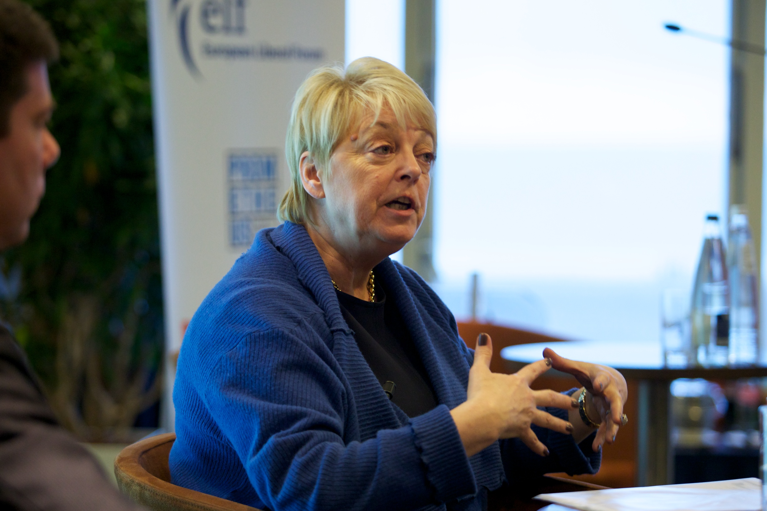 Annemie Neyts bij het VVD seminar democratisering